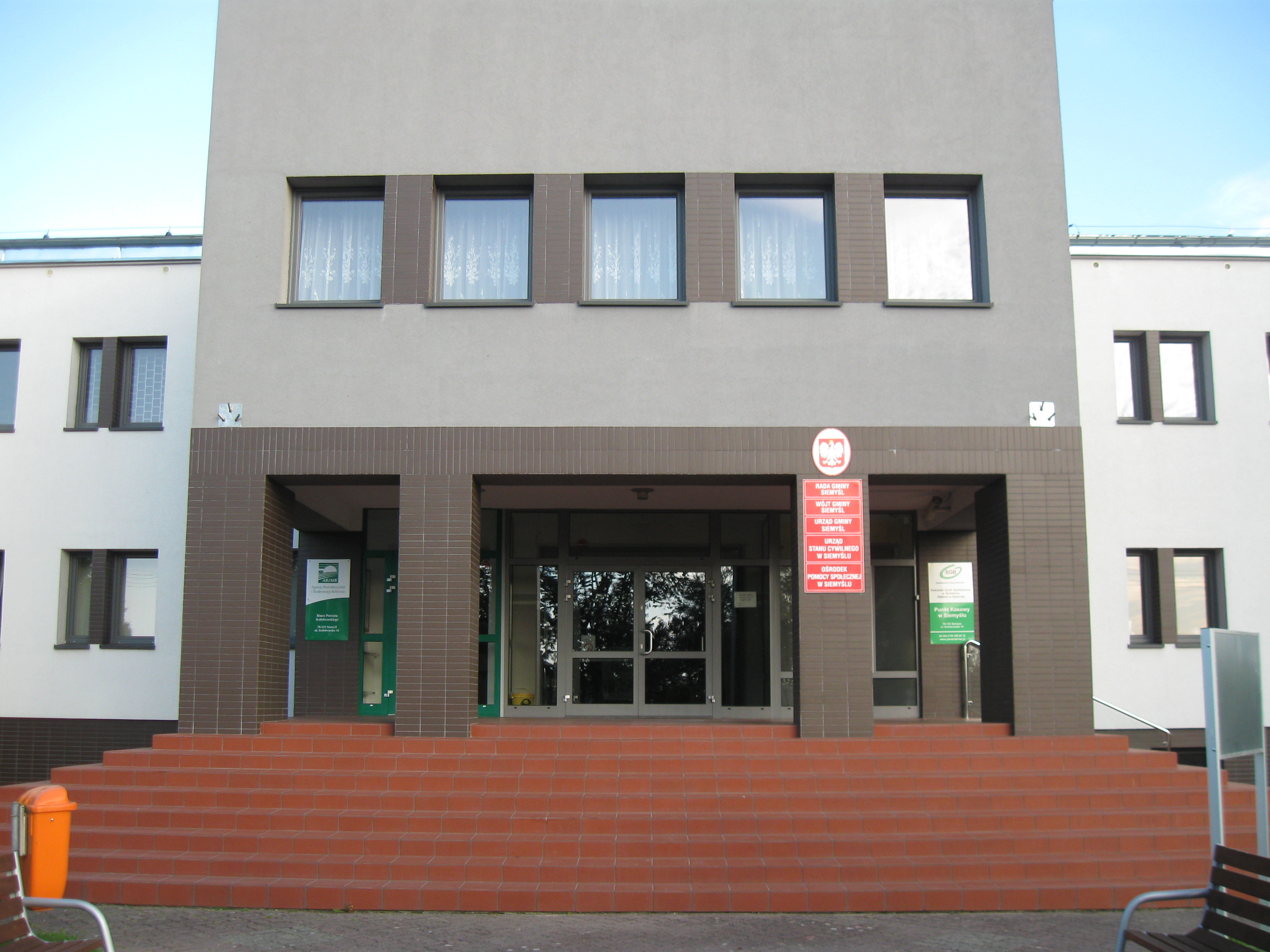 Budynek Urzędu Gminy w Siemyślu.